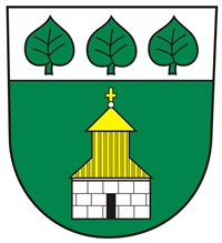 Znak obce Bolehošť